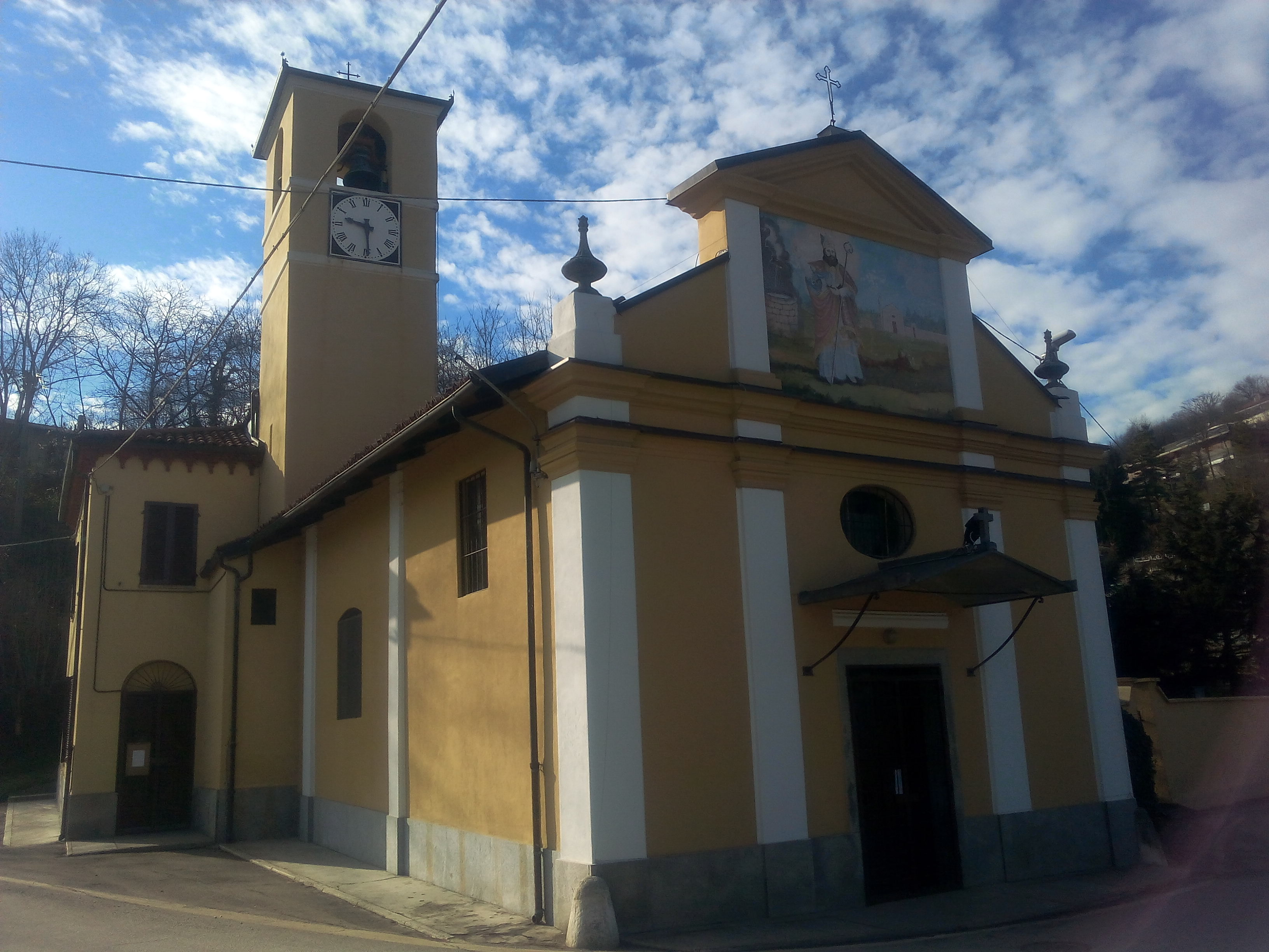 Cordova (Castiglione Torinese, TO): parrocchiale di San Grato